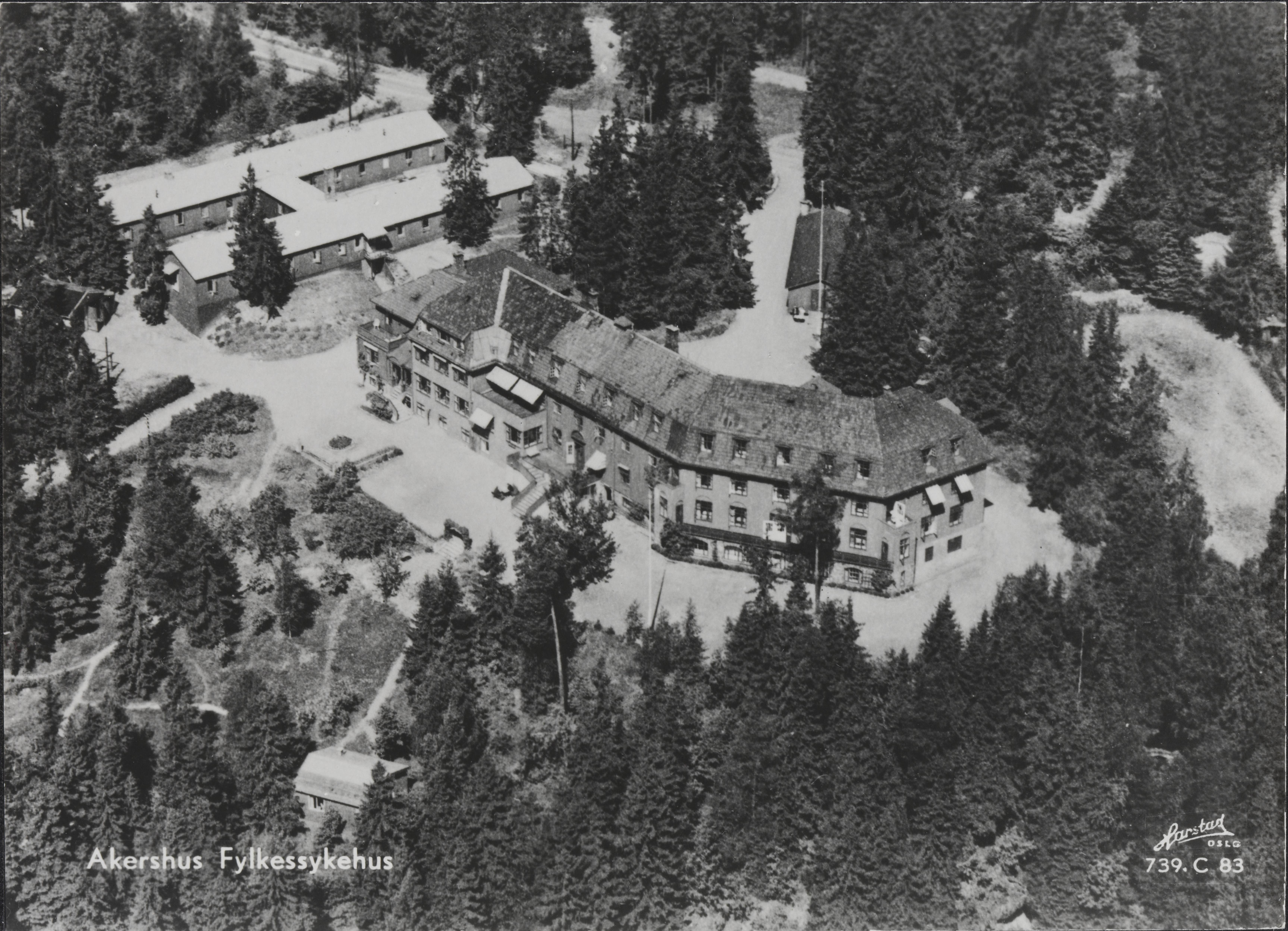 Midtstuen Sanatorium, senere drevet som Akershus Fylkessykehus. Bildet er hentet fra Nasjonalbibliotekets bildesamling